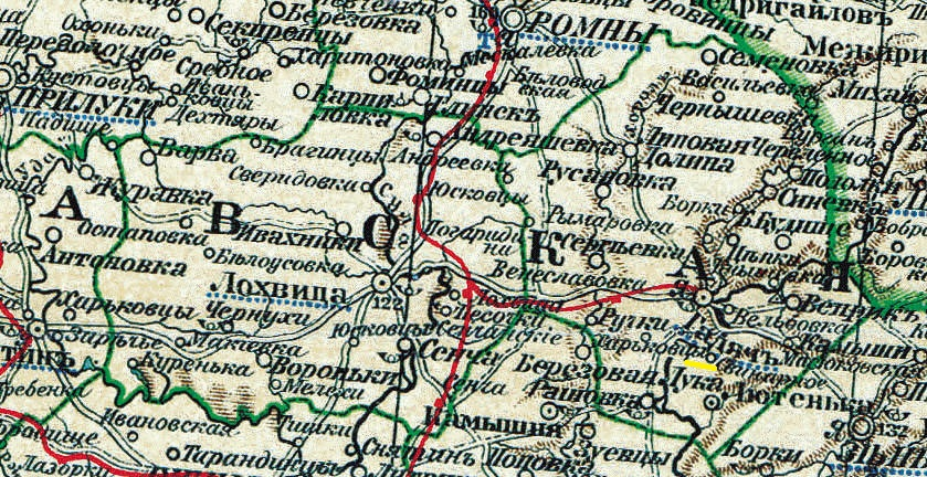 Полтавская губерния Гад.уезд